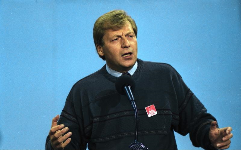 11.-13.9.1989 37. Bundesparteitag der CDU in der Bremer Stadthalle